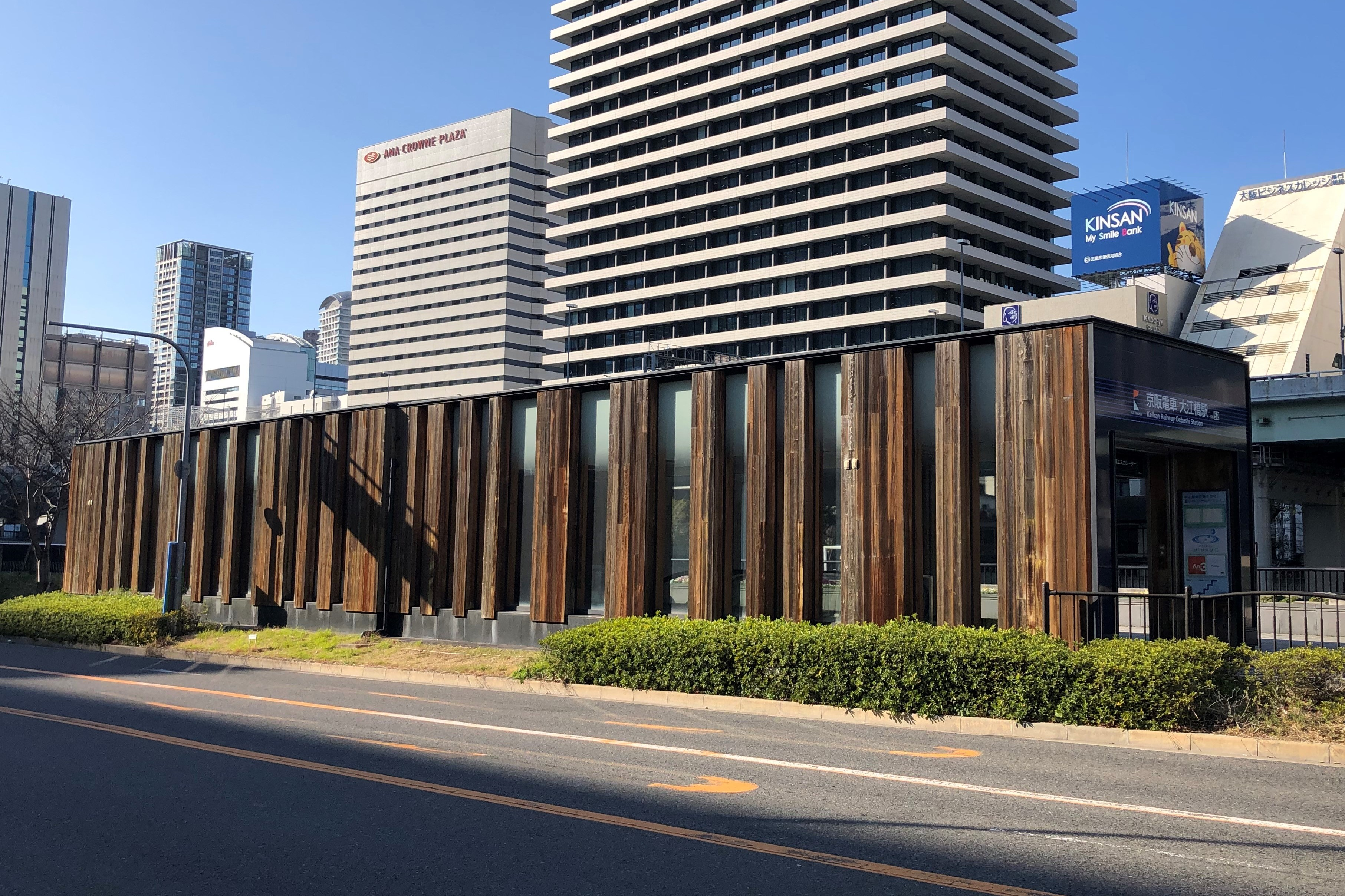 京阪電鉄大江橋駅